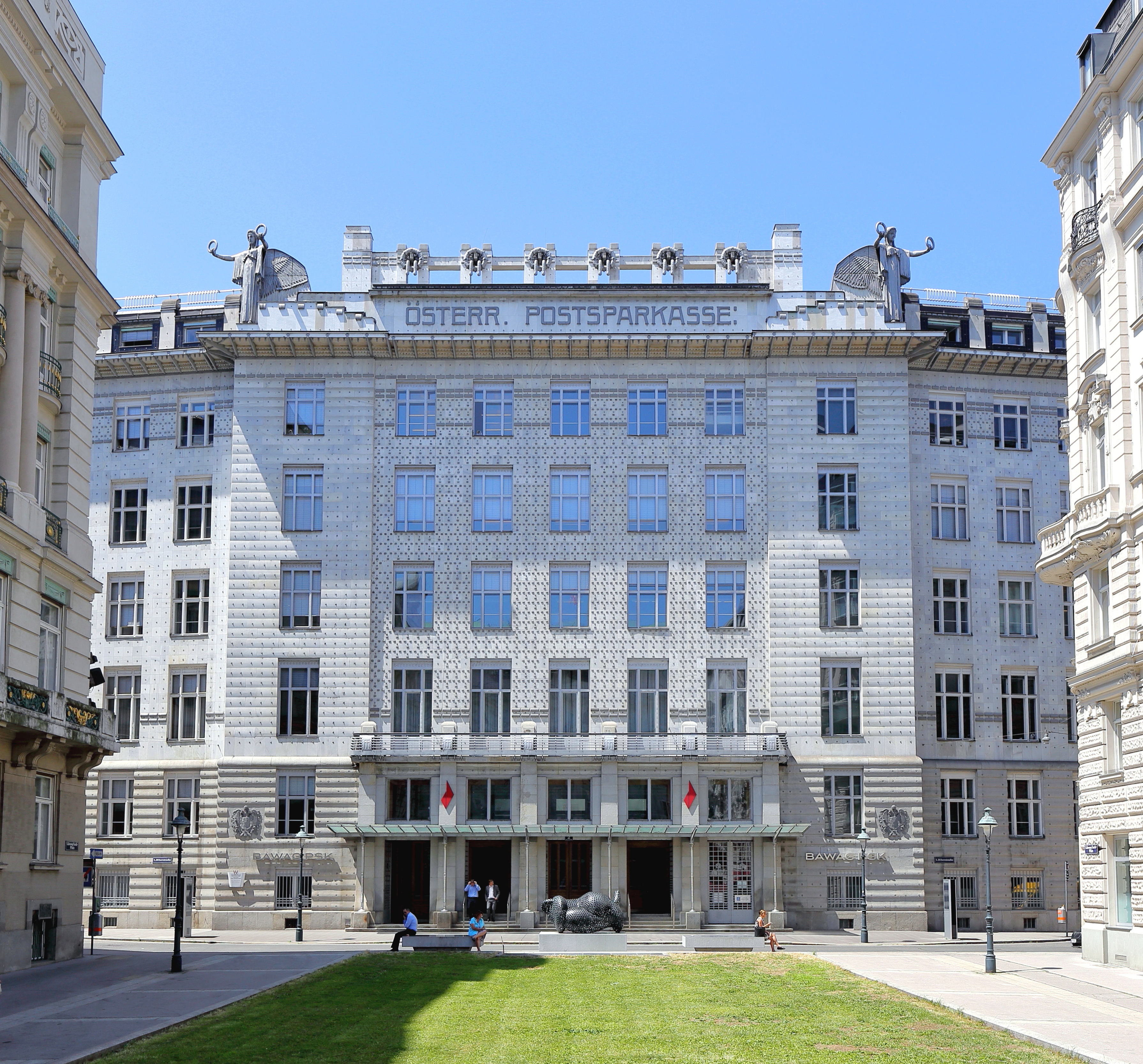 Hauptfassade des Postsparkassengebäudes in der österreichischen Bundeshauptstadt Wien. Das Gebäude wurde nach Plänen von Otto Wagner in den Jahren 1903/4 bis 1906/7 errichtet und ist eines der berühmtesten Jugendstilgebäude Wiens. Von 1910 bis 1912 erfolgte eine Erweiterung. Davor die Bronzeguss-Skulptur "Ferryman 1997" von Tony Cragg.